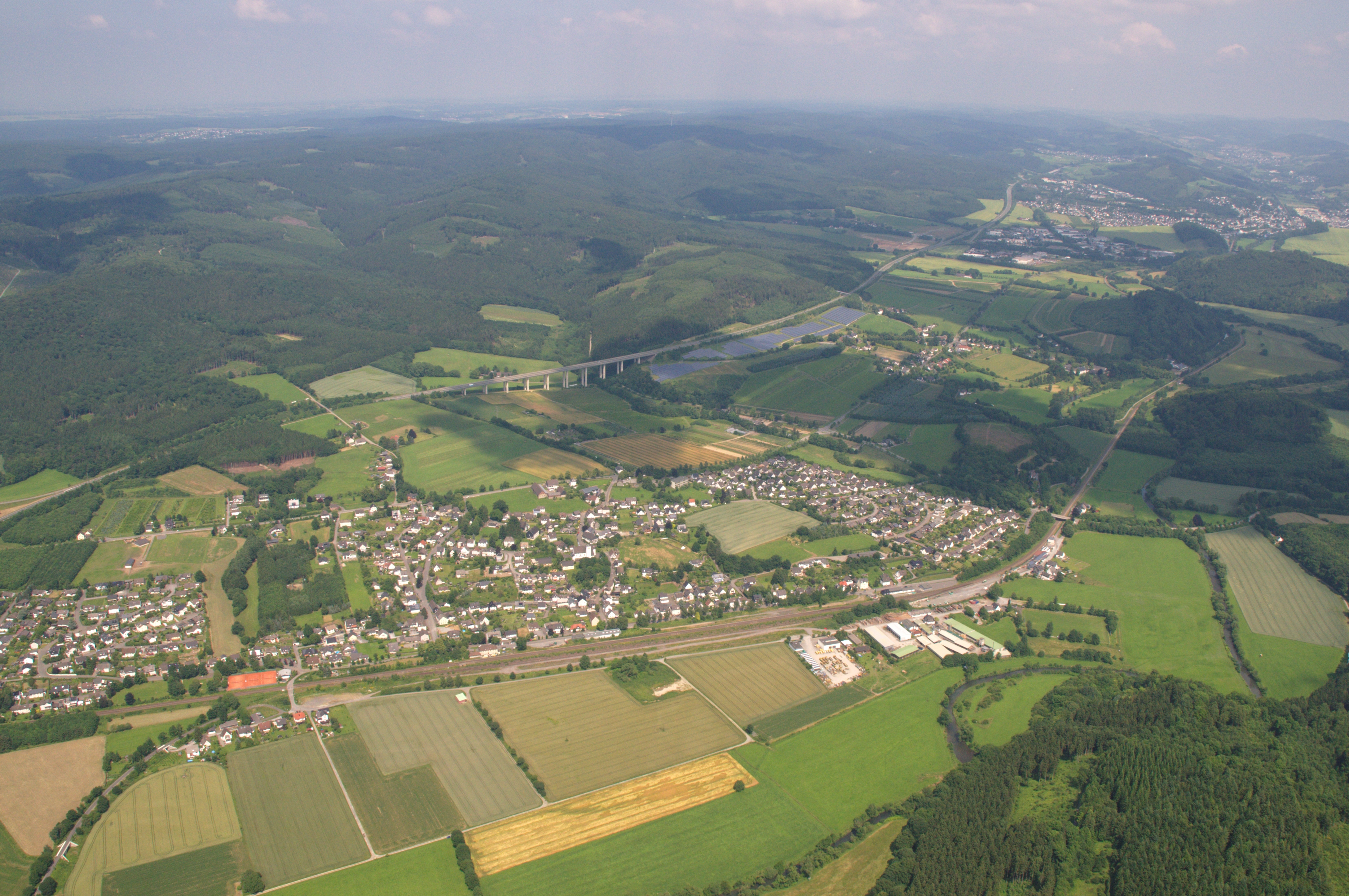 Fotoflug Sauerland-Ost - Ruhrtal, Wennemen, A 46 mit Talbrücke Wennemen, B 7, Obere Ruhrtalbahn, Solaranlage